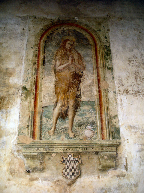 Certaldo, Palazzo Pretorio, affresco Maddalena